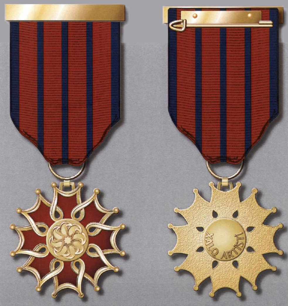 “Xalq artisti” fəxri adının döş nişanı